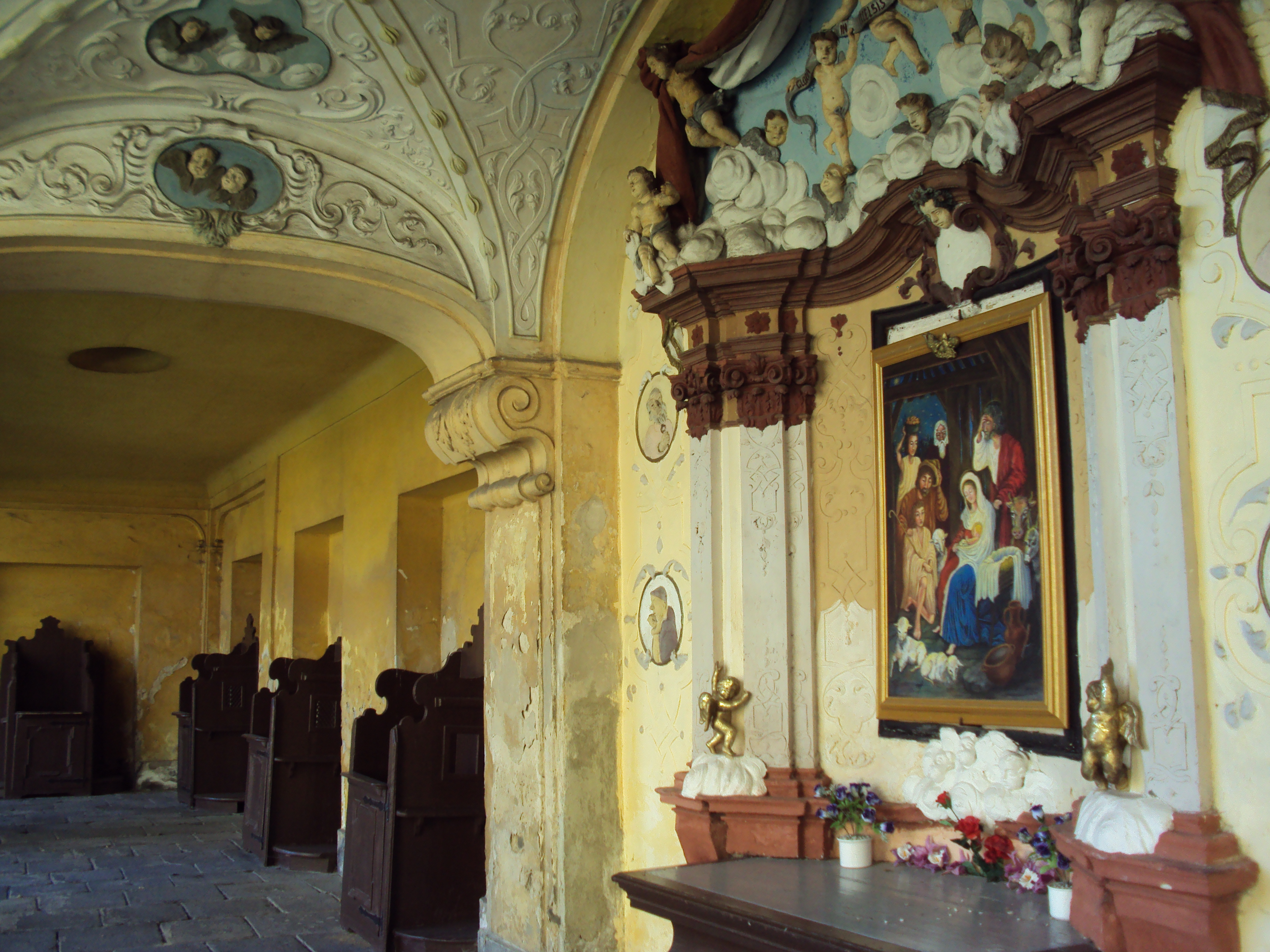 Ambit farního kostela Horní Police